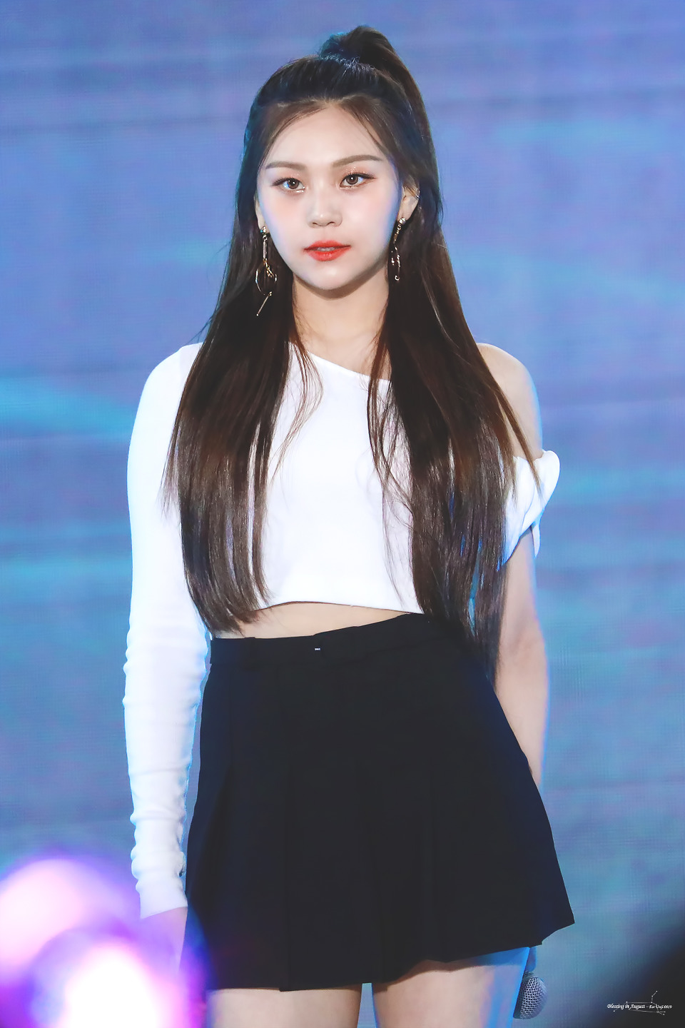 2019.10.06 SMUF 서울뮤직페스티벌 엄지 (1)